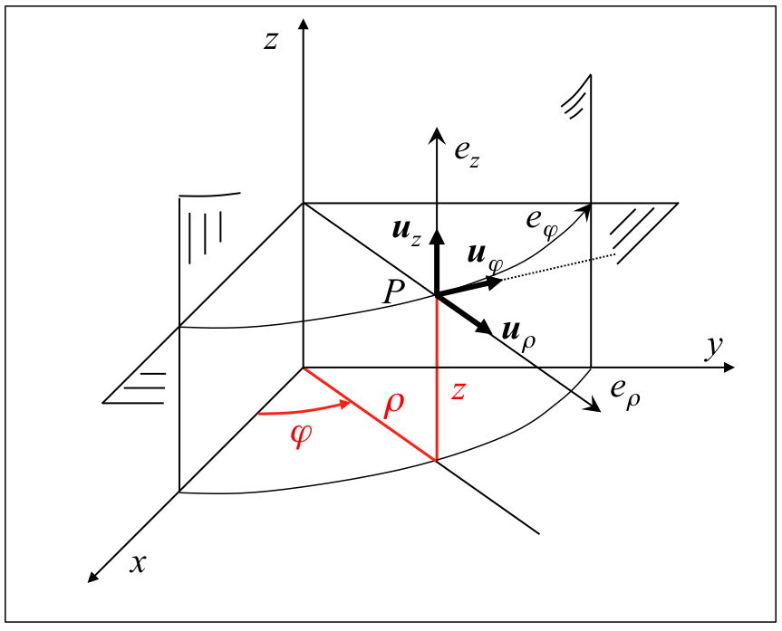 Erreferentzia-sistema zilindrikoen ezaugarriak.